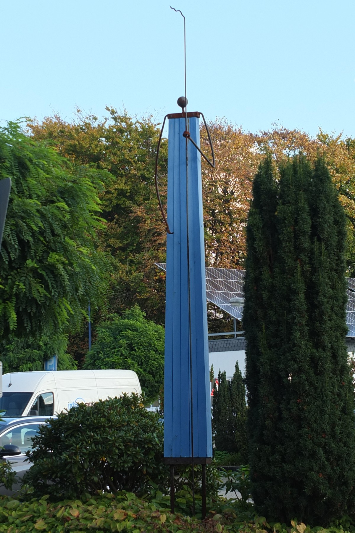 Willy L. Bitter: Wächter, Hilden, Am Feuerwehrhaus 1